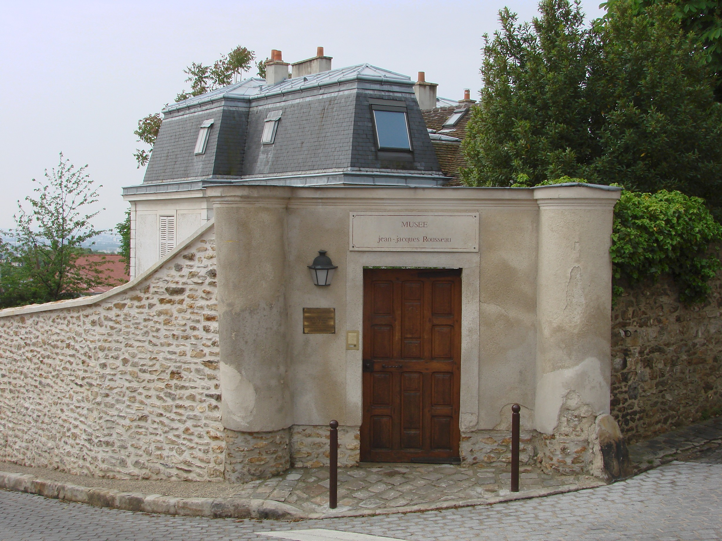 Montmorency, France, Musée Jean-Jacques Rousseau